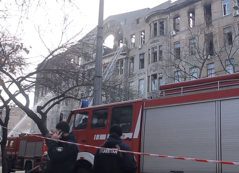 Пожежа в Інституті морської біології